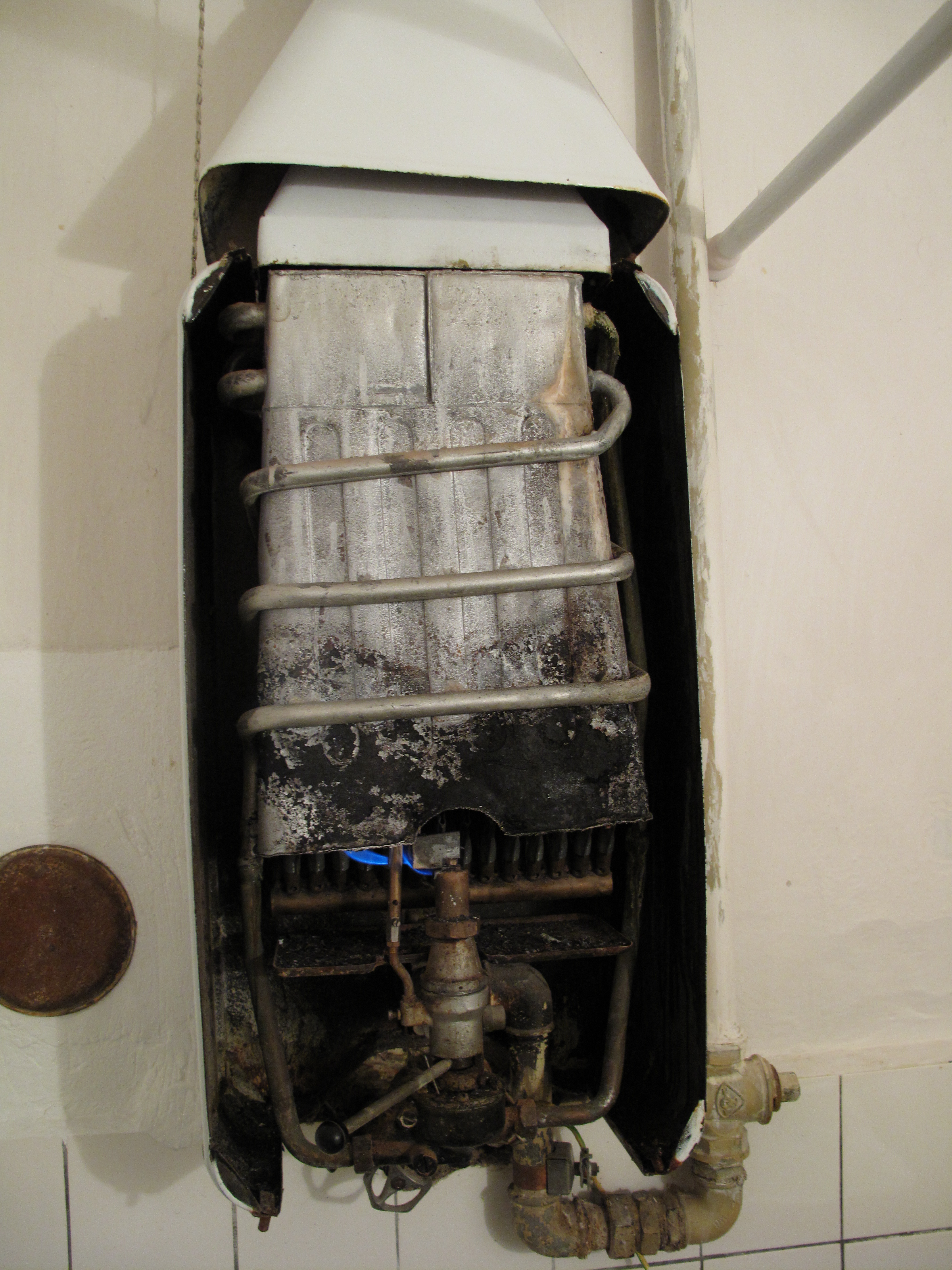 Karma Mora typ PO 35 a její části.